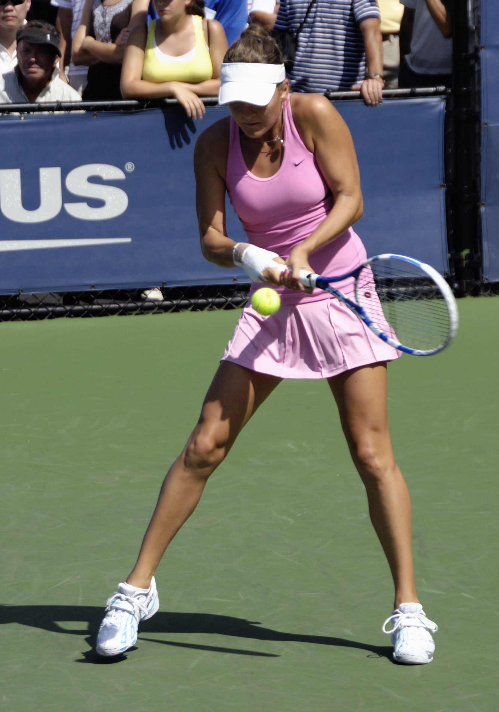 Agnieszka Radwańska at the 2009 US Open